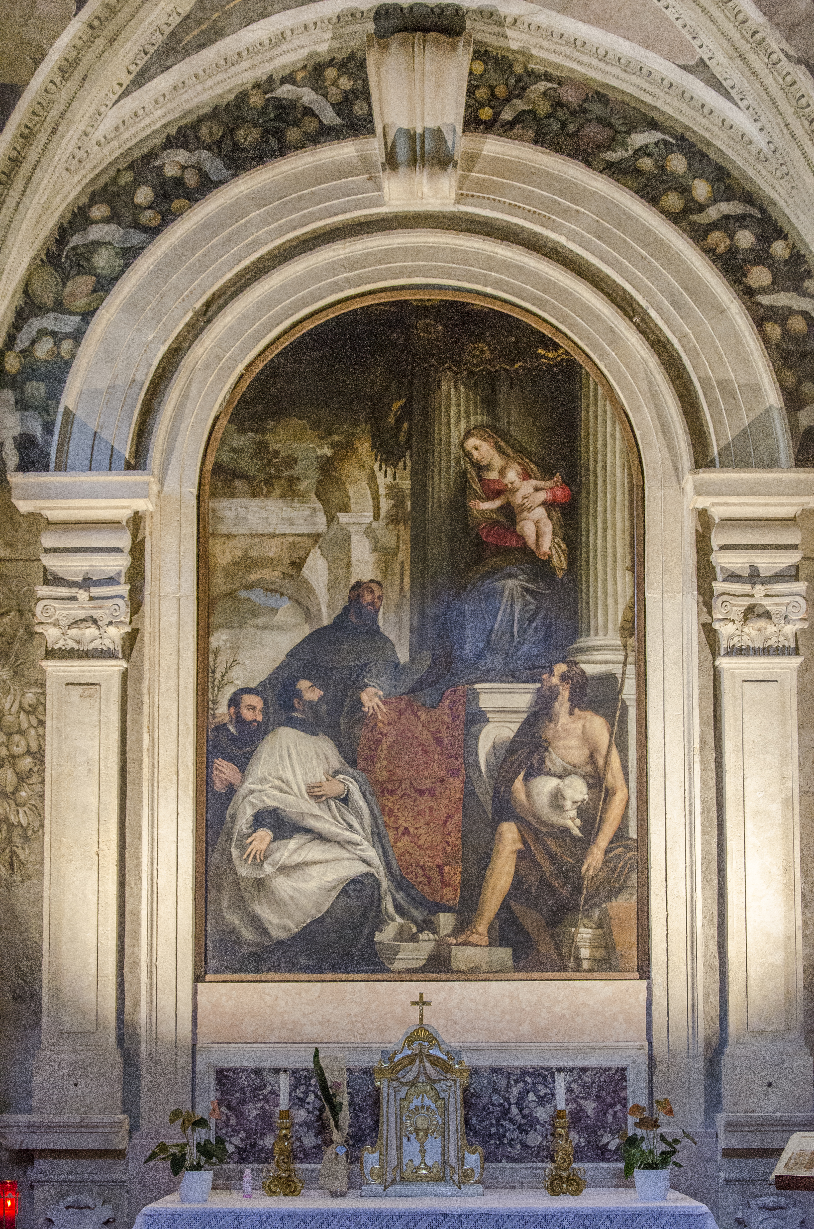 Chiesa di San Paolo a Verona, pala di Paolo Caliari detto "il Veronese" nella cappella Marogna